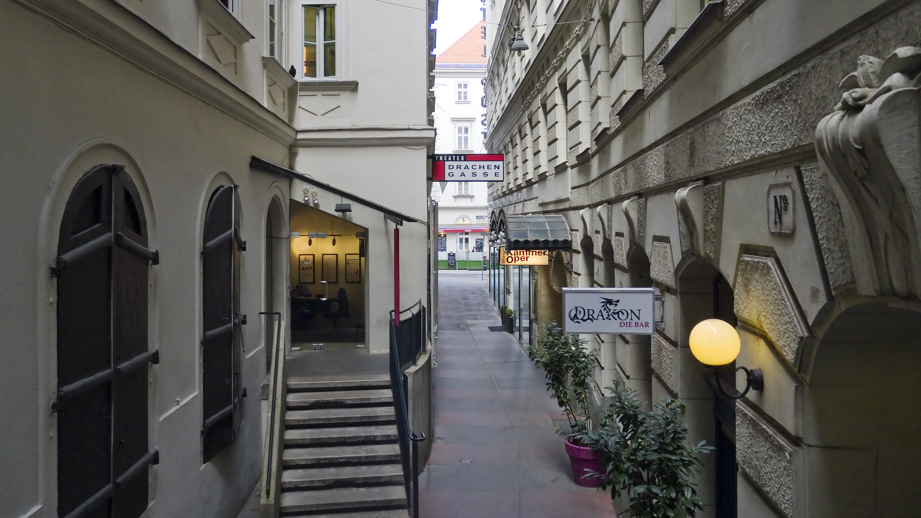 Drachengasse in Wien 1 Richtung Norden